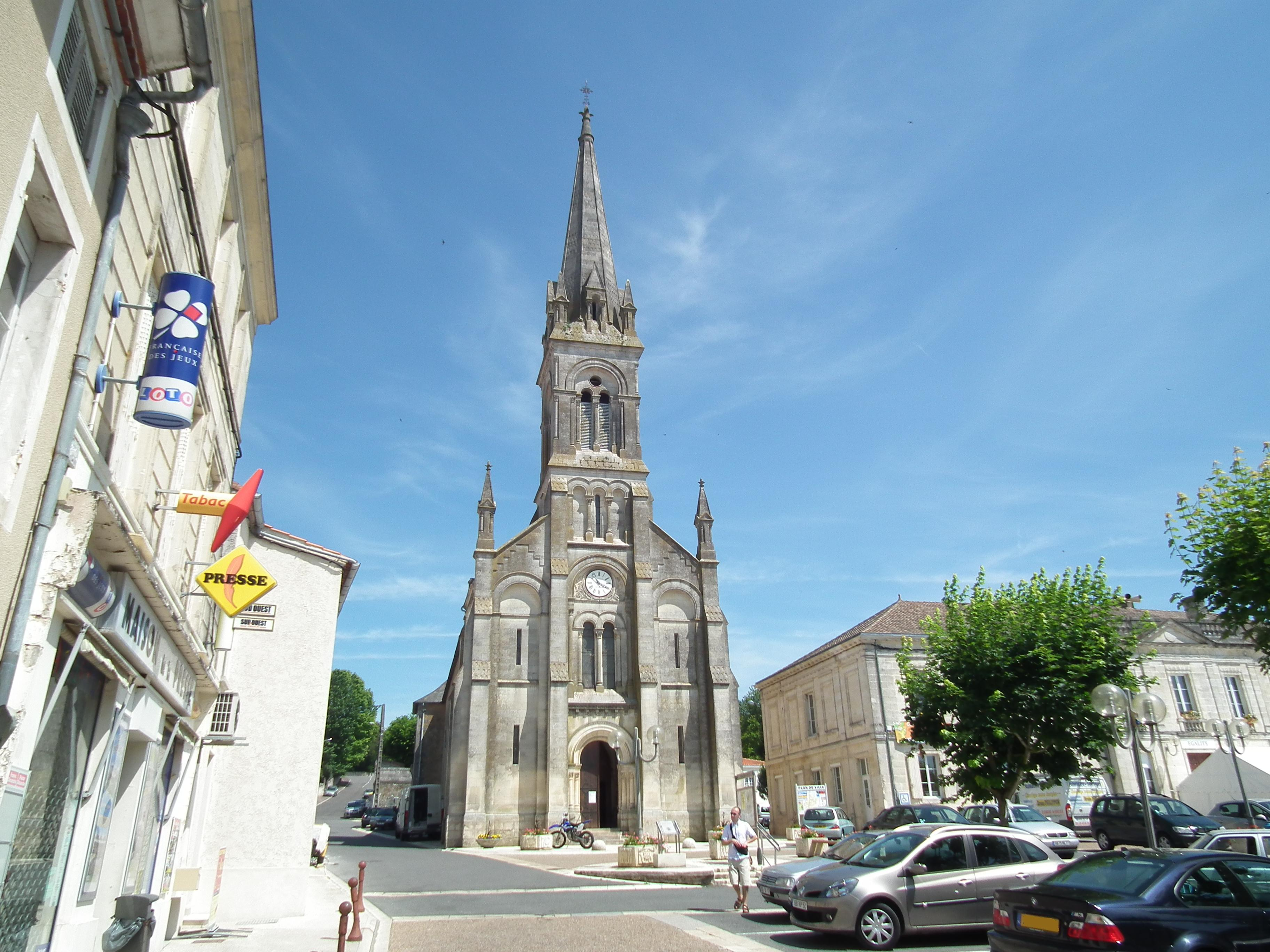 Le centre-ville de Mirambeau